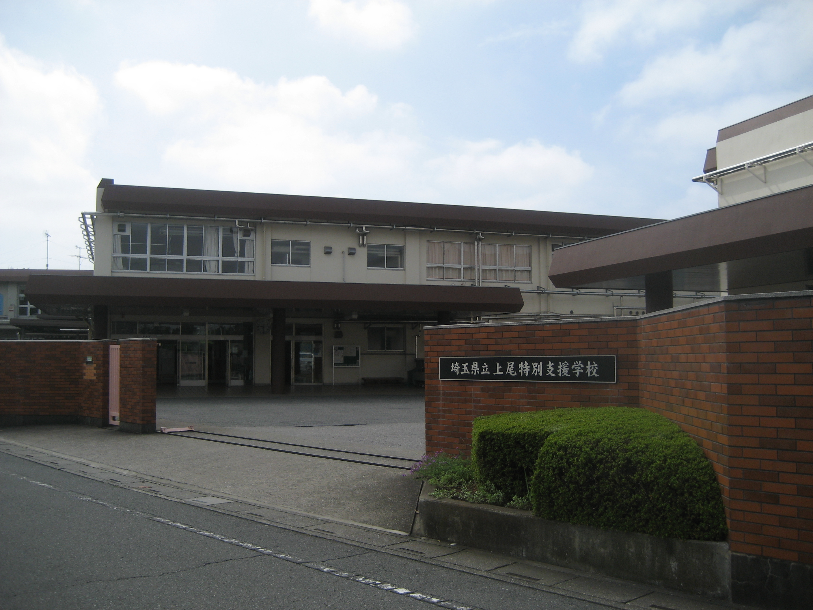 埼玉県立上尾特別支援学校（正門付近を撮影）